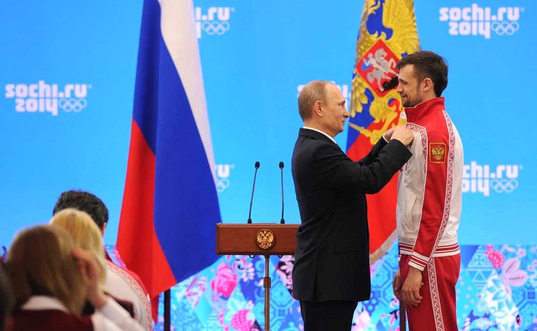 Орденом Дружбы награждён олимпийский чемпион в скелетоне Александр Третьяков.